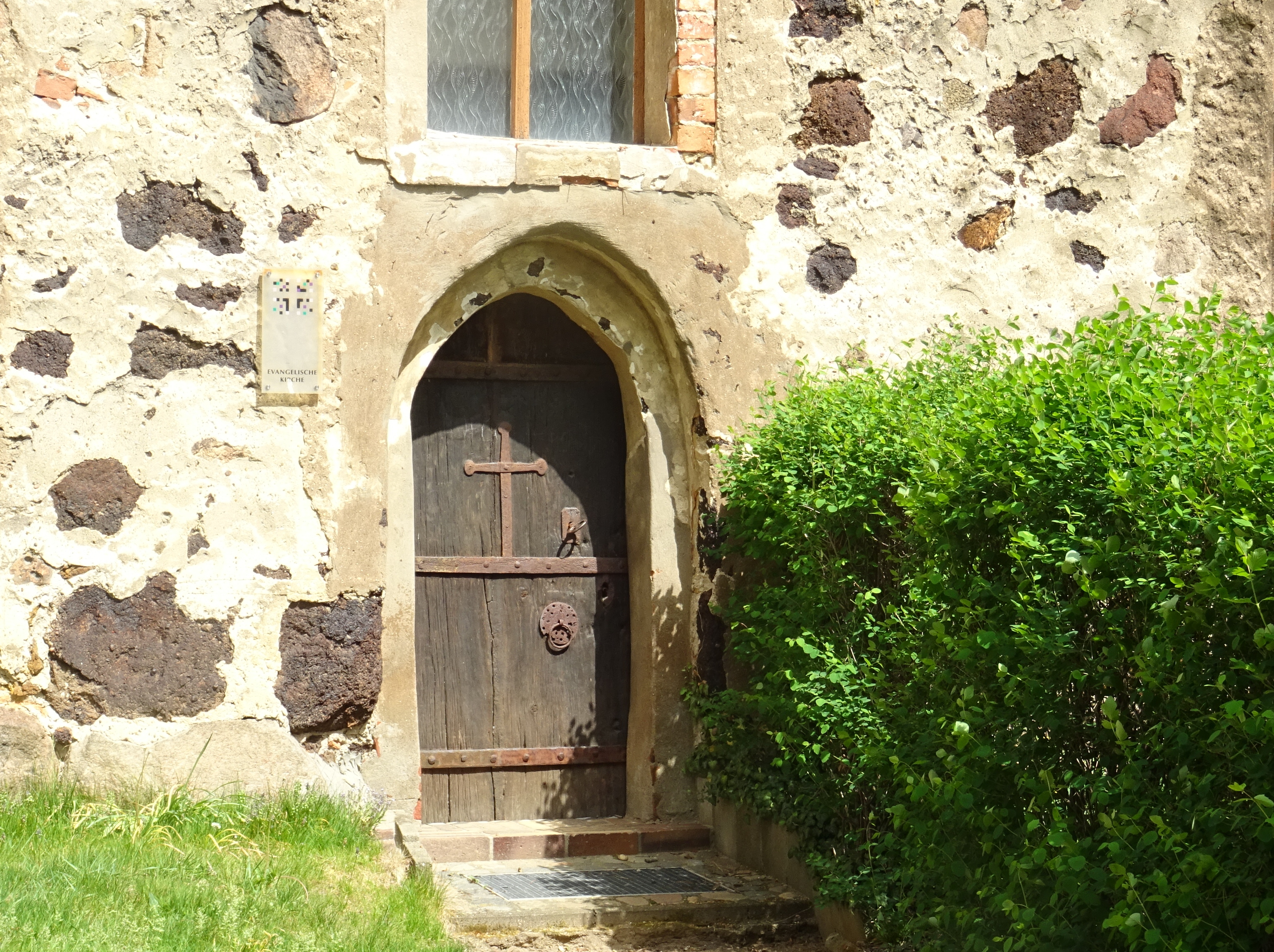 Dorfkirche Knippelsdorf, Eingang